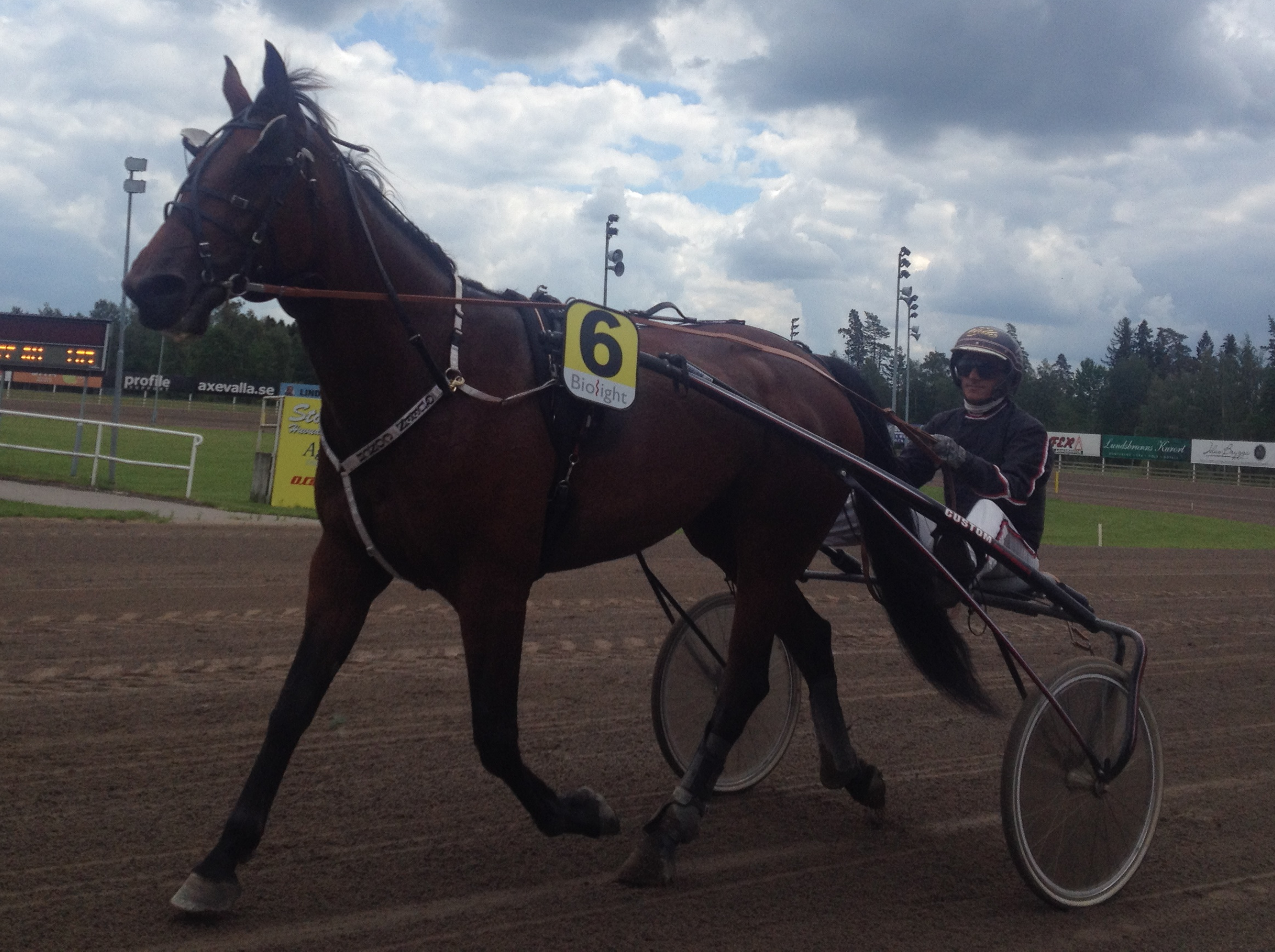 Carl-Erik Lindblom med hästen Queen Conch på Axevalla travbana, 6 juni 2014